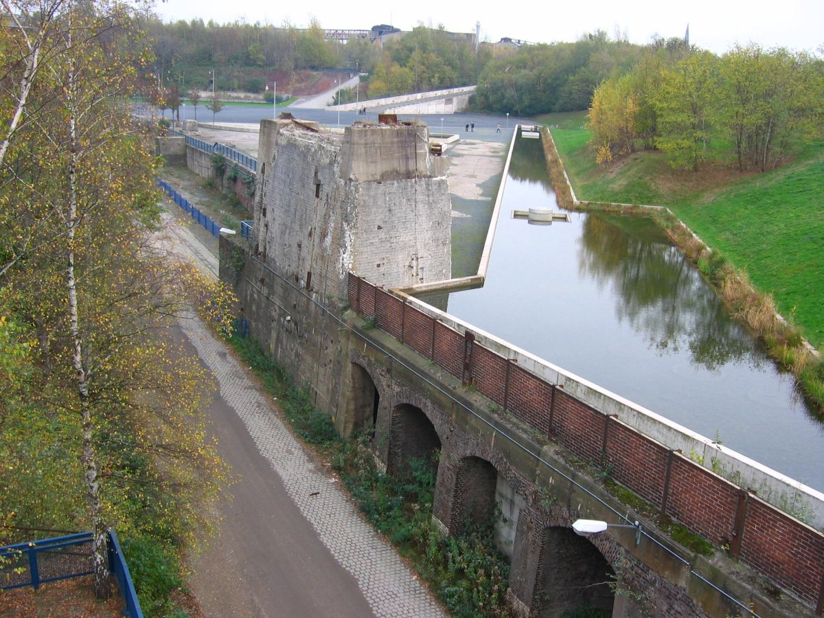 Wasserfläche im Westpark von Bochum